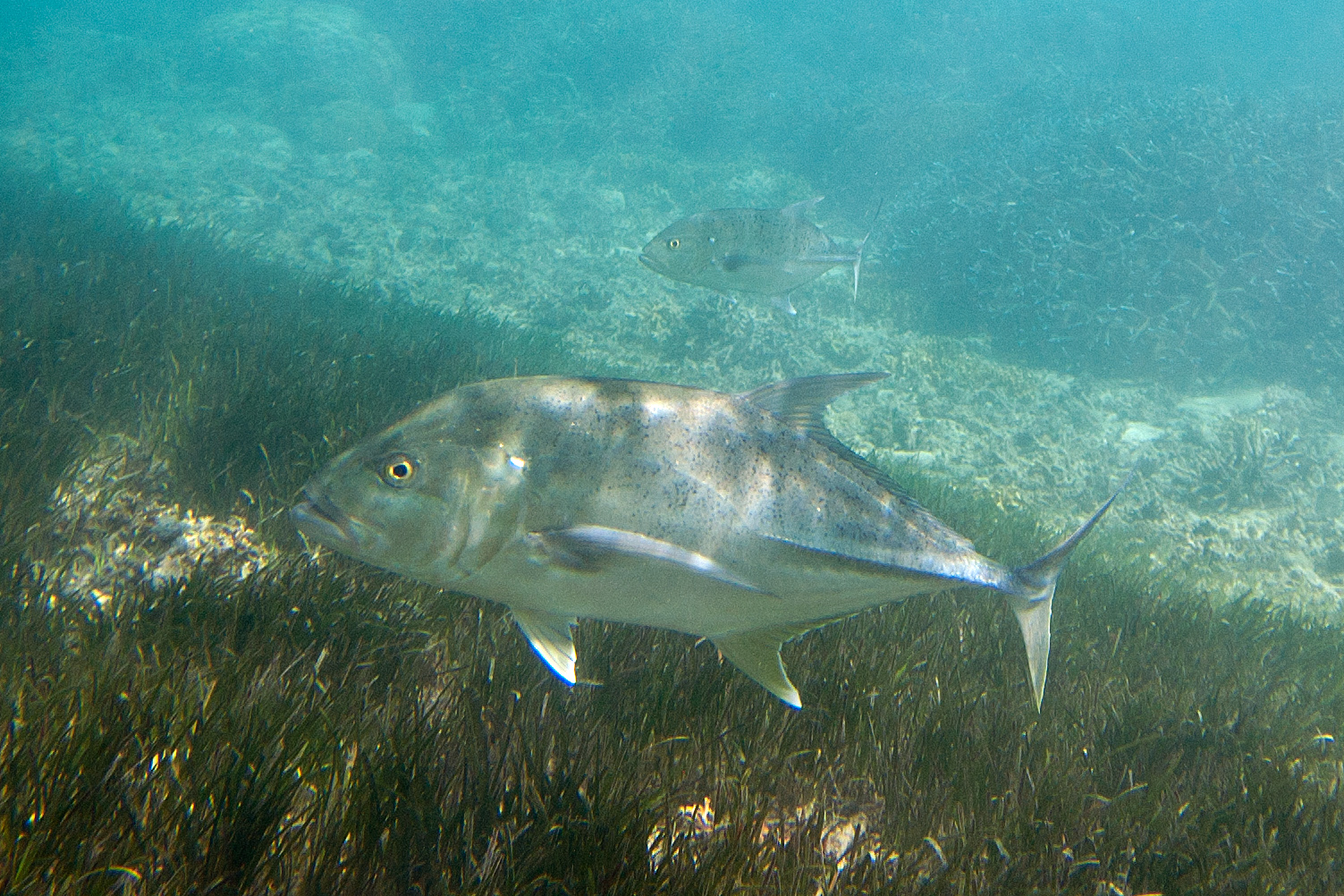 giant trevally Caranx ignobilis